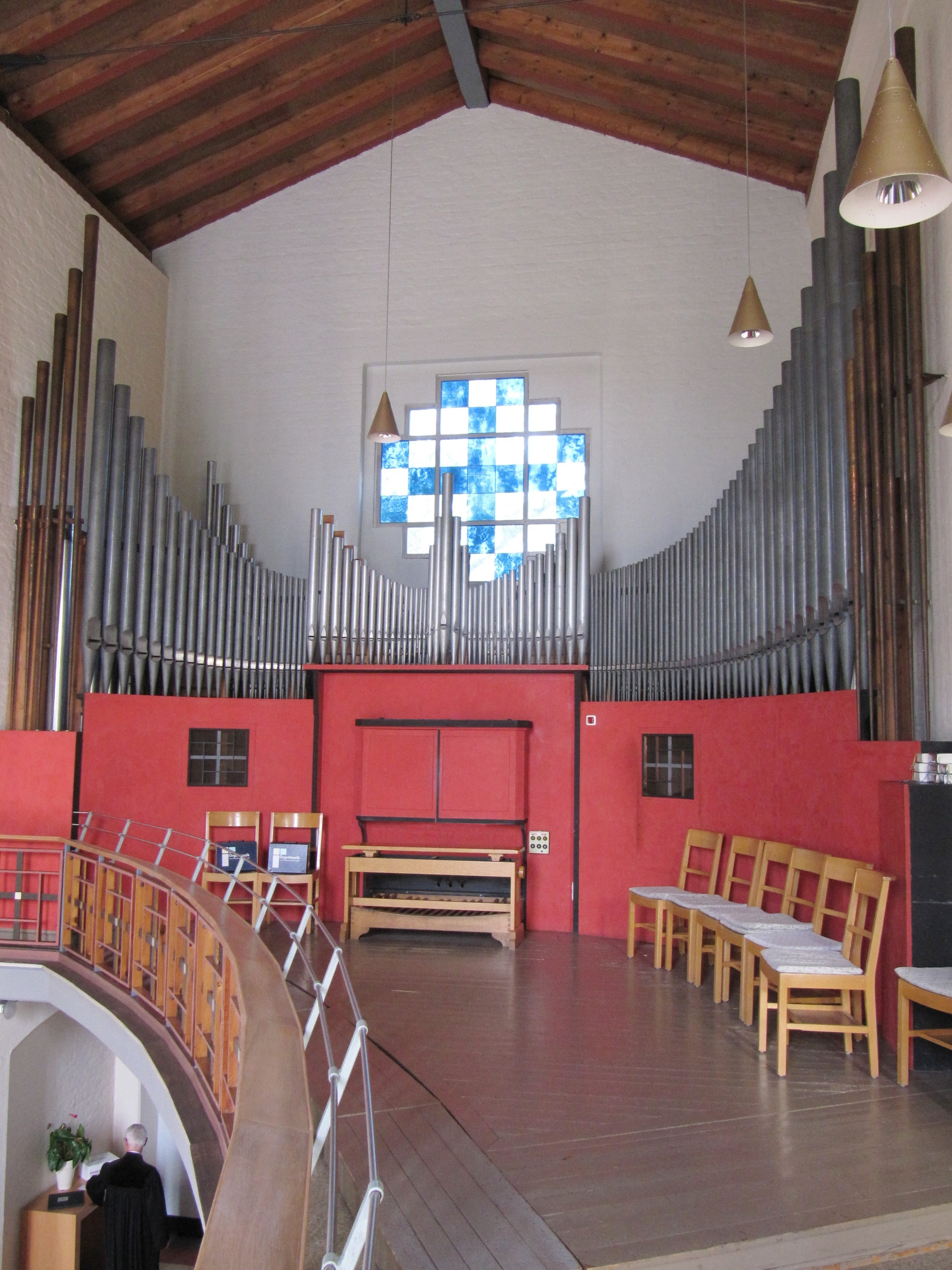 Orgel St. Matthaus, Regensburg